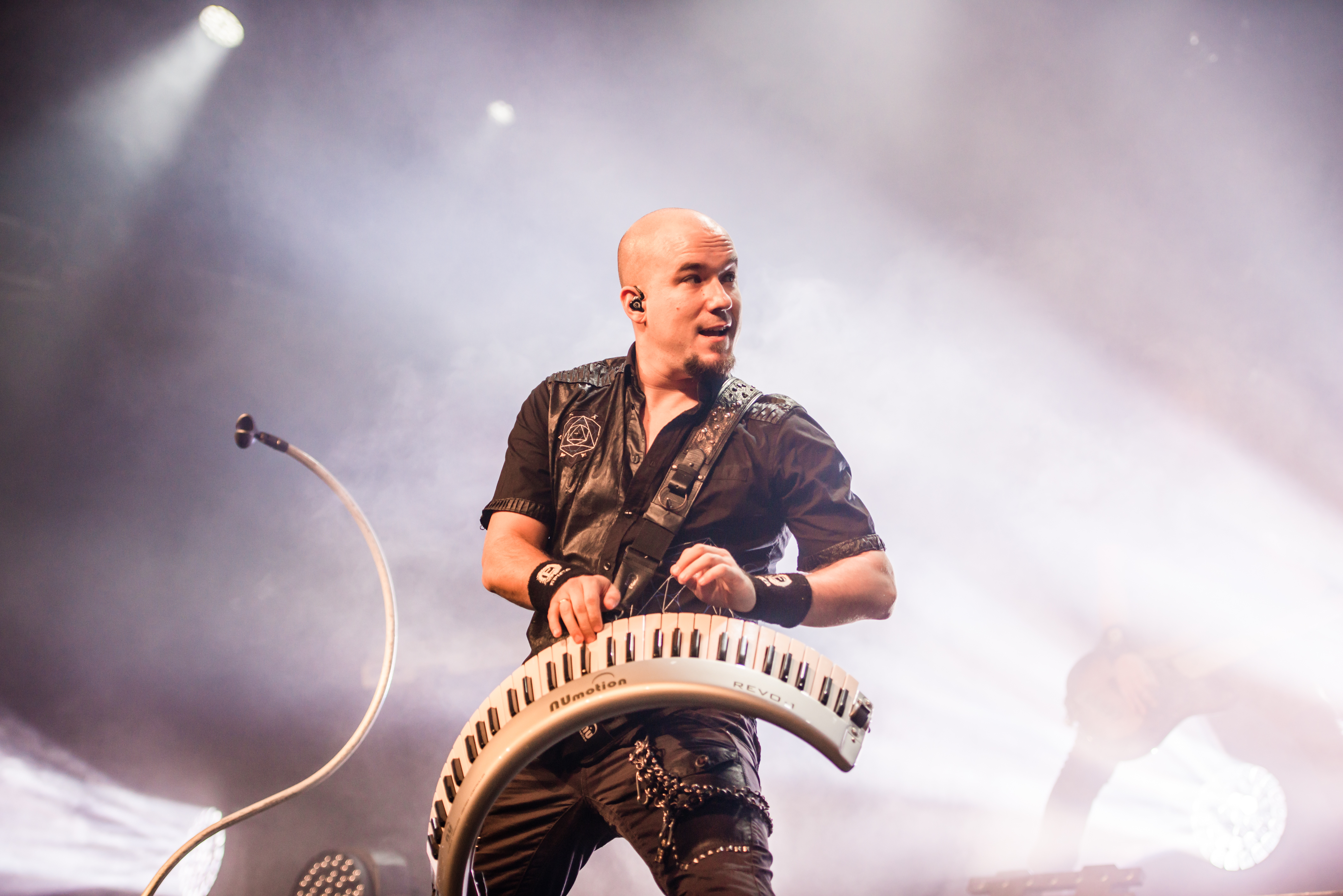 'Epica - Epic Metal Fest - Eindhoven'